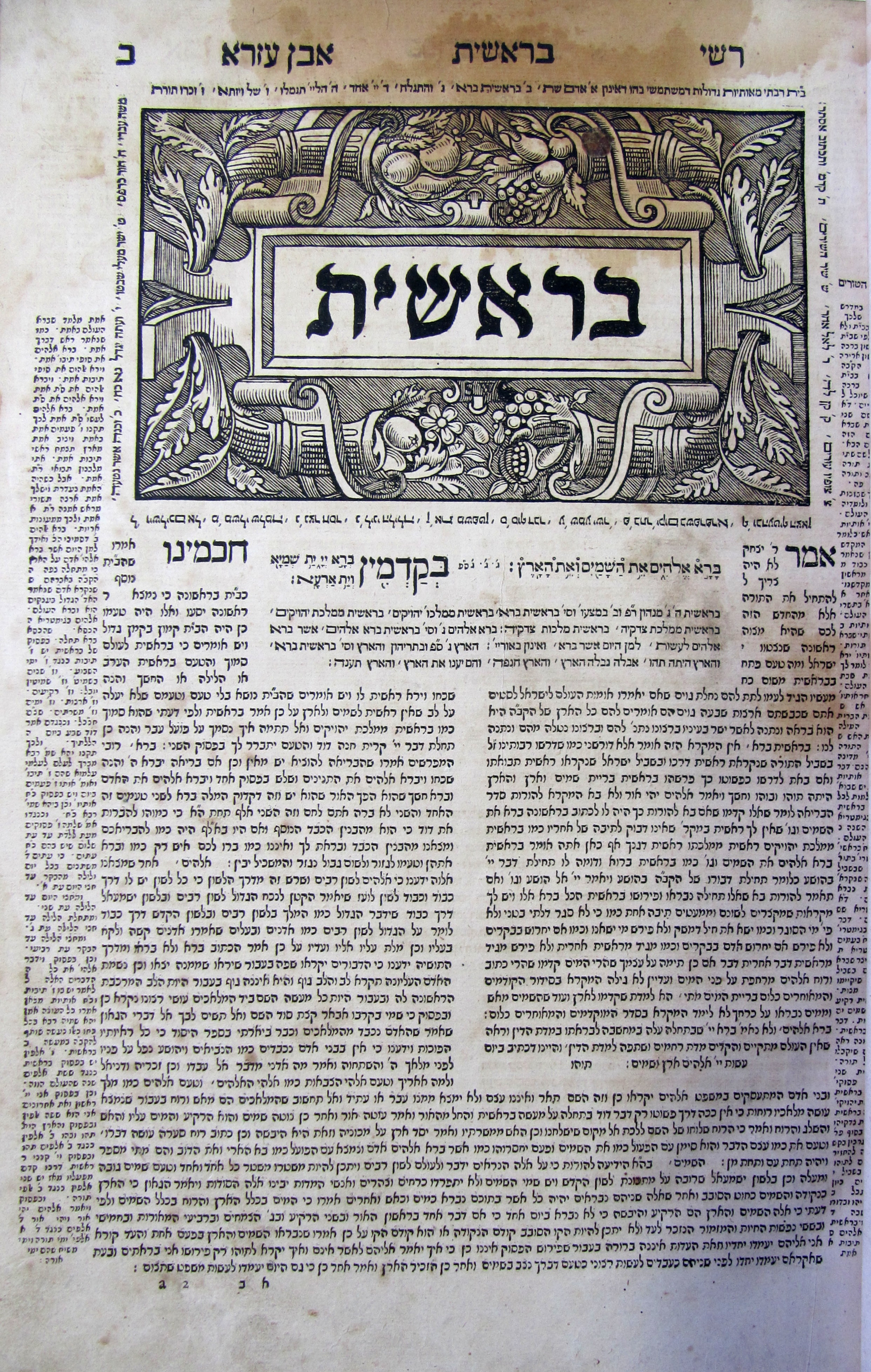 Титул книги Бытия